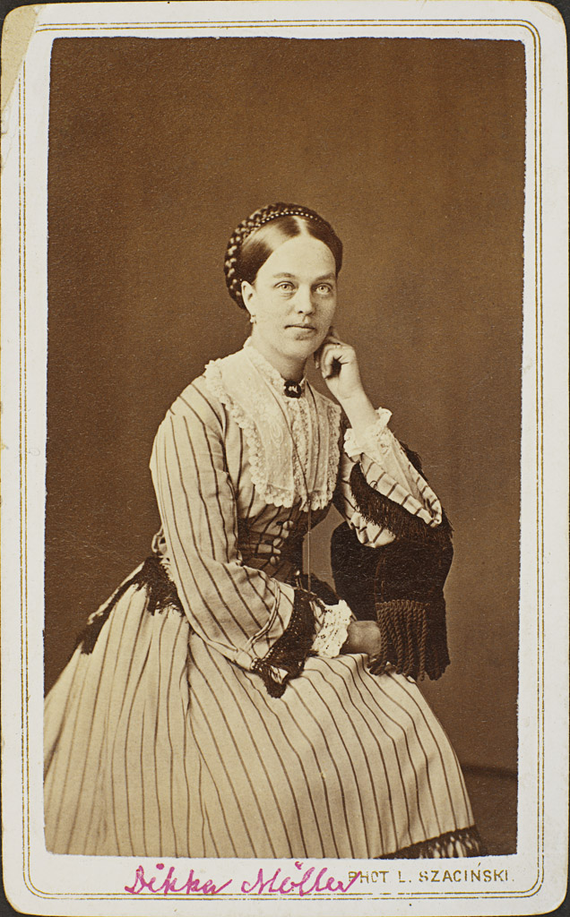 Tittel / Title: Portrett av Dikka Møller (1838-1912), sommeren 1872 / Portrett av Diderikke Anette Møller (1838-1912), sommeren 1872 Motiv / Motif: Visittkort. Dato / Date: sommeren 1872 Fotograf / Photographer: L. Szacinski (Christiania) Sted / Place: Oslo Eier / Owner Institution: Nasjonalbiblioteket / National Library of Norway Lenke / Link: Bildesignatur / Image Number: blds_01165